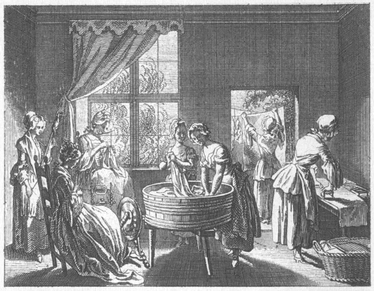 Einige Arten nützlicher Beschäftigungen. b) Frauenzimmerarbeiten im Nähen, Spinnen, Waschen, Plätten usw. (Beschreibung lt. Quelle)